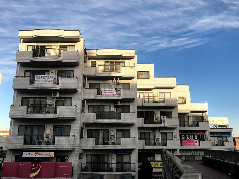 東京都多摩市の集合住宅。京王相模原線 京王永山駅、小田急多摩線 小田急永山駅近く。